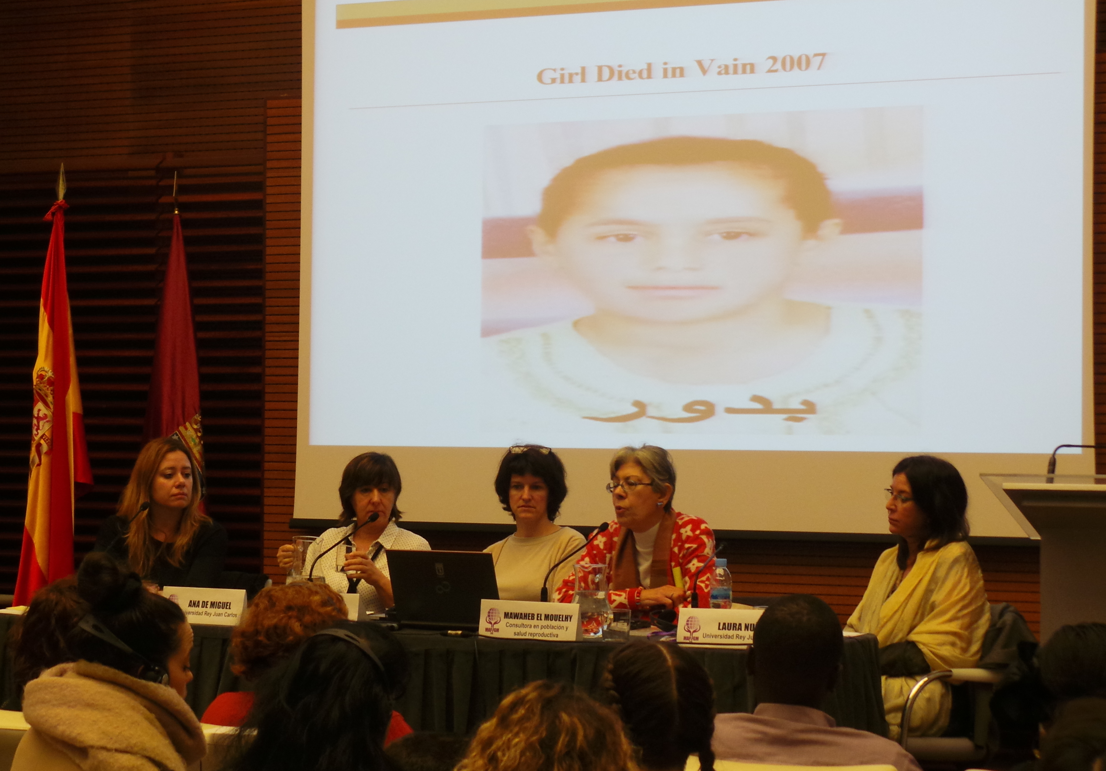 Mesa redonda sobre Mutilación Genital Femenina Observatorio de Igualdad de Género de la Universidad Rey Juan Carlos. Imagen de una niña egipcia muerta en 2007 a causa de la MGF Madrid enero 2017